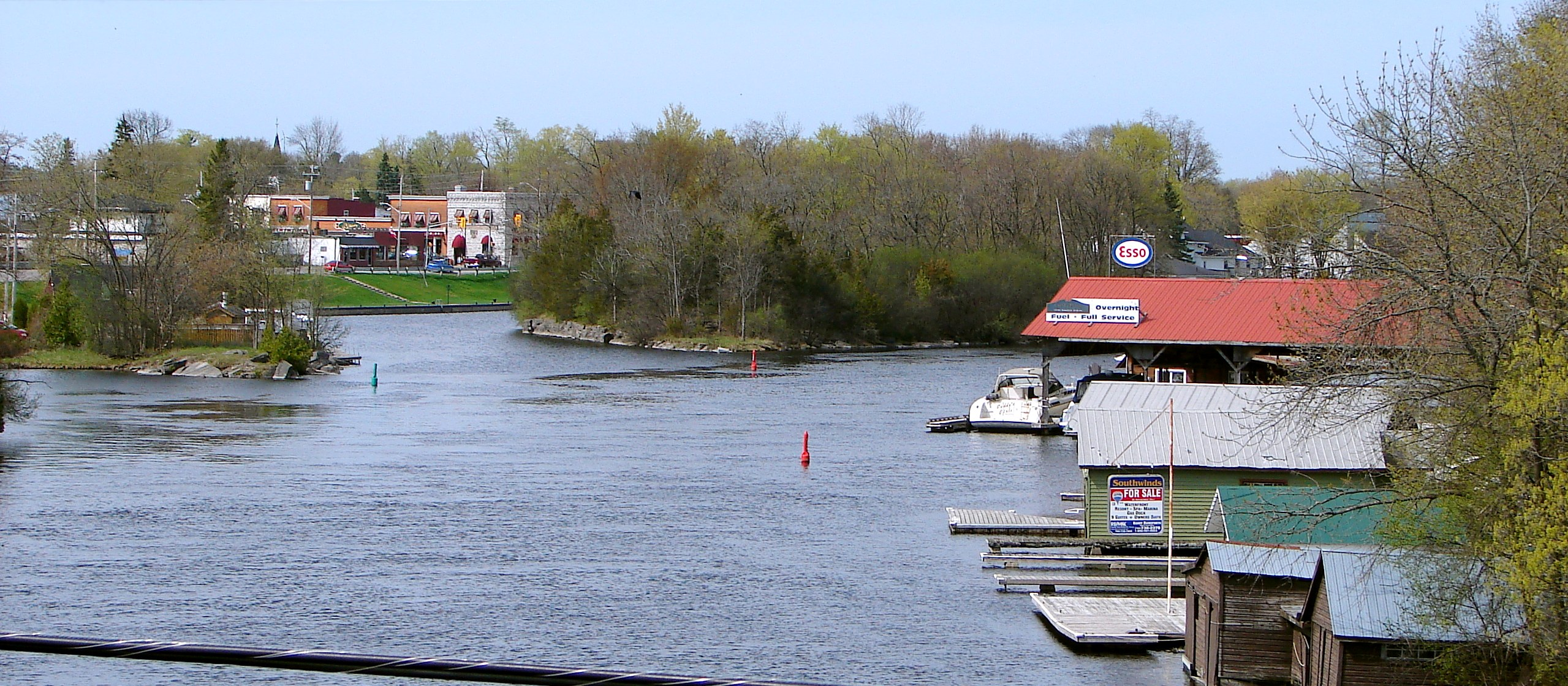 Bobcaygeon, Ontario, Canada